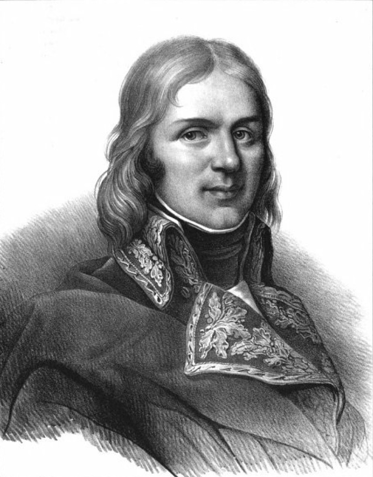 Album du Dauphiné - tome IV, litographie de Jean-Étienne Championnet